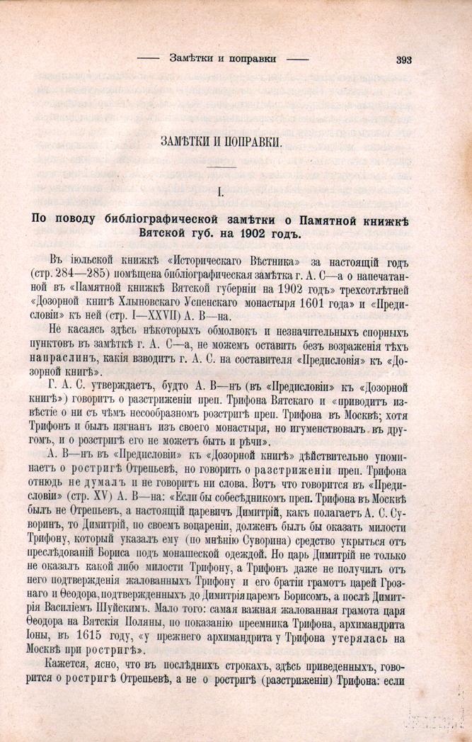 Полемическая статья А. С. Верещагина против А. А. Спицына